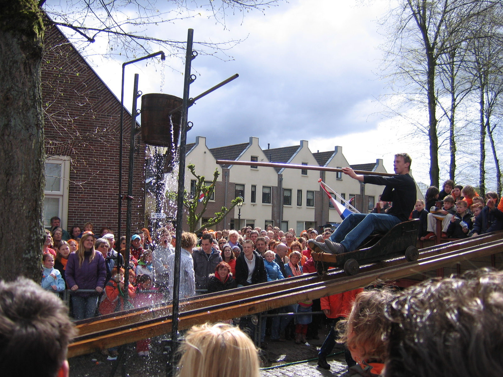 Zelf gemaakte foto 29-04-2006